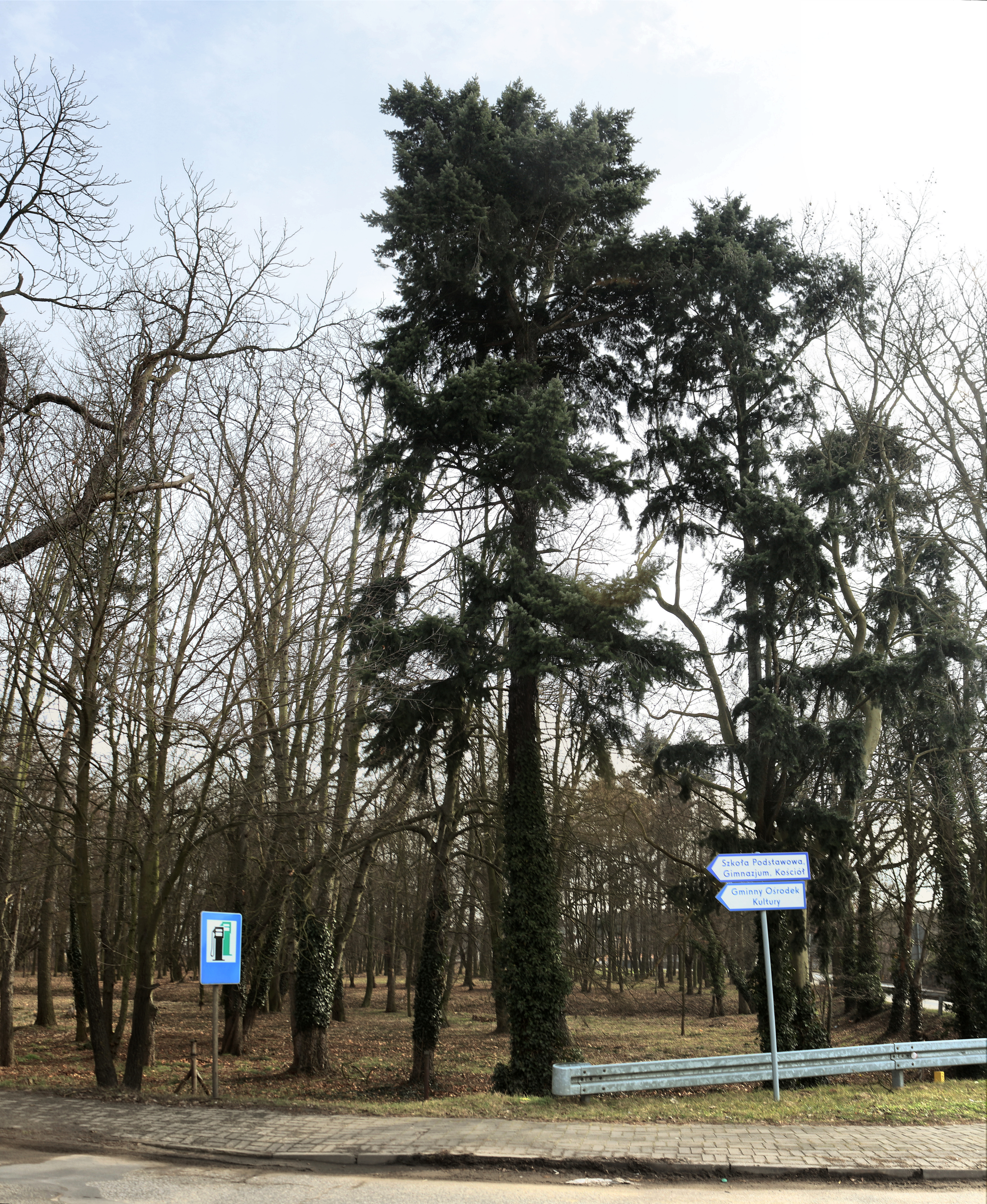 Bojadła, park, 1 poł. XVIII